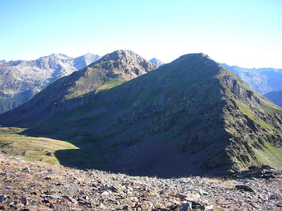 Bonys Blanc i Negre vistos des le Cap de les Cometes; la Vall de Boí, Alta Ribagorça, Catalunya